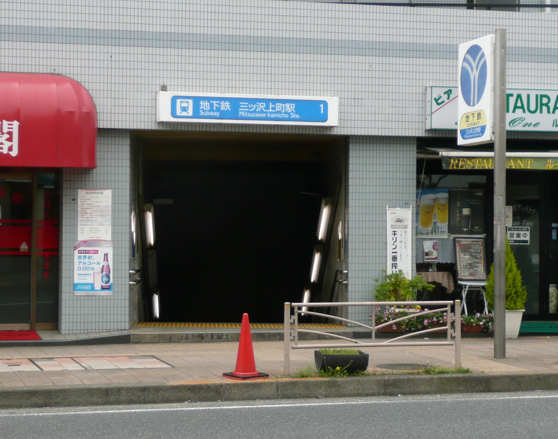 三ツ沢上町駅1番出入口